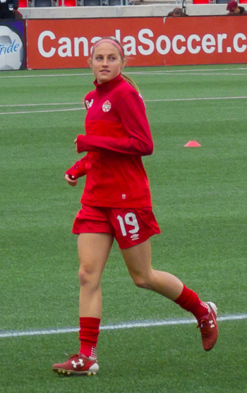 Janine Beckie (19)